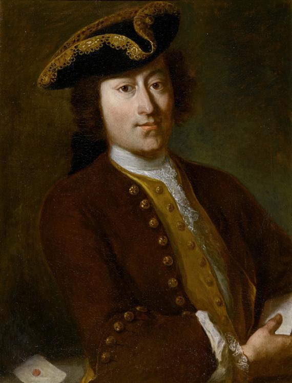 Portrait des Hauptmanns Johann Jakob Fäsch (Basel, 1752–1832). Öl auf Leinwand. 52 x 38 cm.